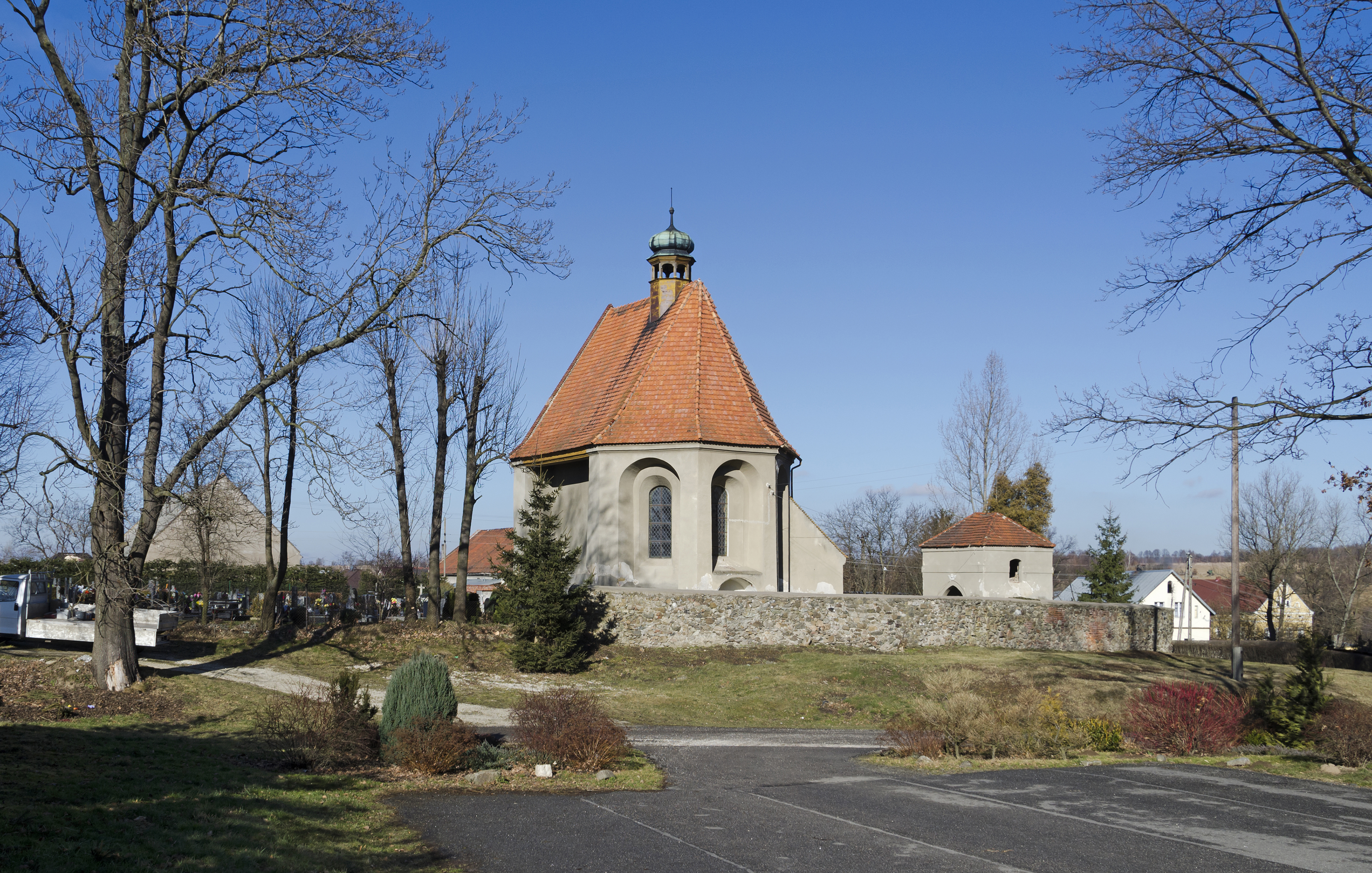 Jaszkowa Dolna, kaplica cmentarna, XIV